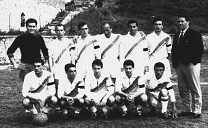 La Narnese vincitrice del campionato di 1° Categoria Umbra 1961-62. Promossa in serie D - In alto da sin.: Saccodossi, Amerini C., Foschi, Bravetti, Moretti, Ratini, De Bonis (All.). In basso da sin.: Chieruzzi, Gabrielli, Amerini P., Pica, Strinati